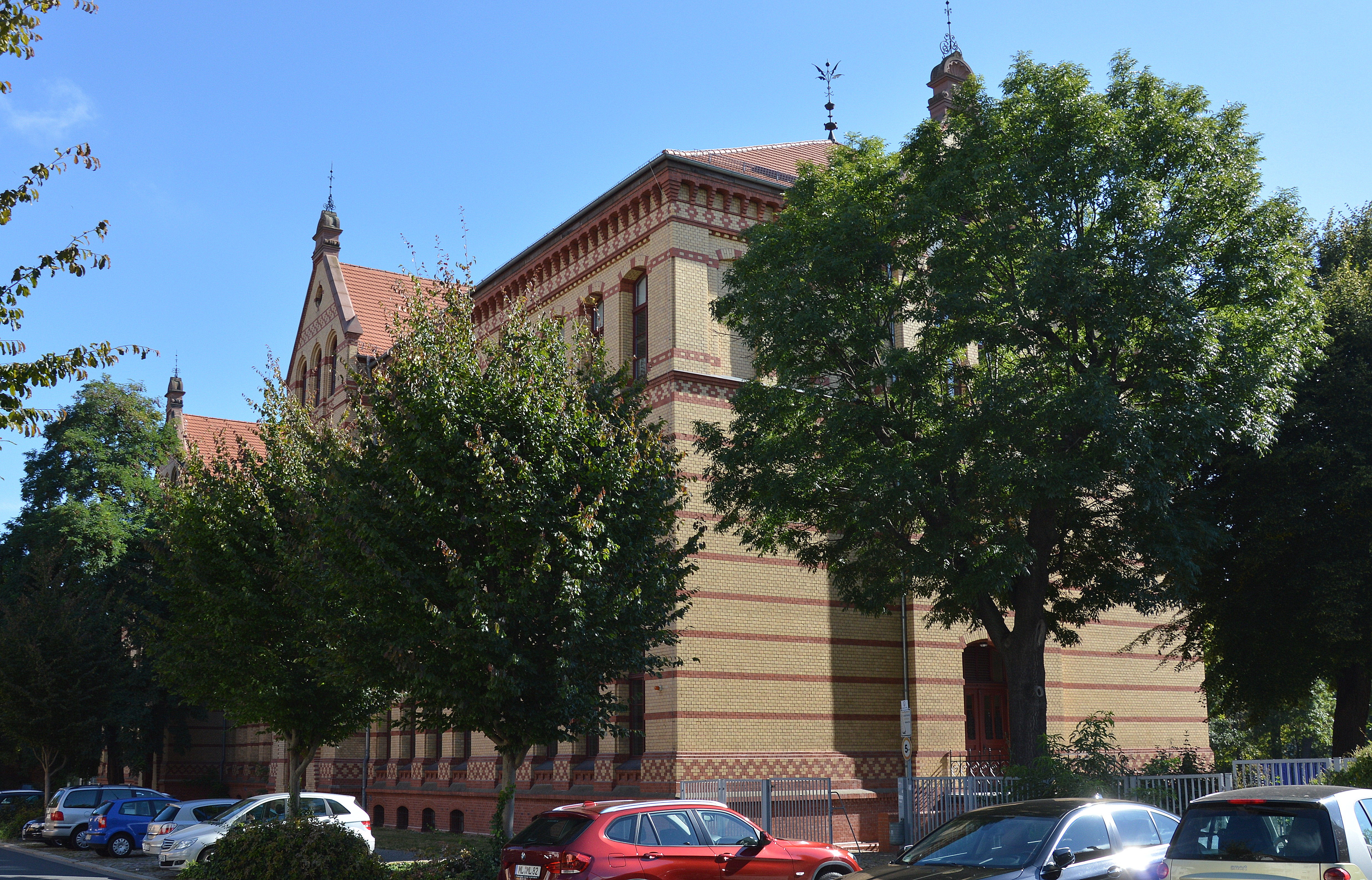 Lessingschule Sudenburg